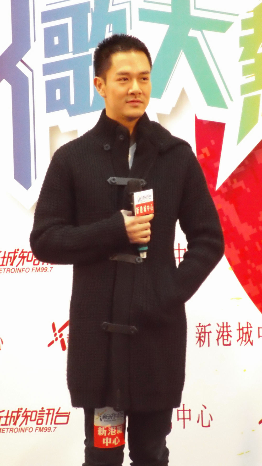 中文（香港）: 藍奕邦的樣子